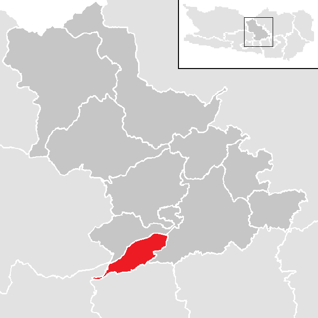 Bezirk Feldkirchen